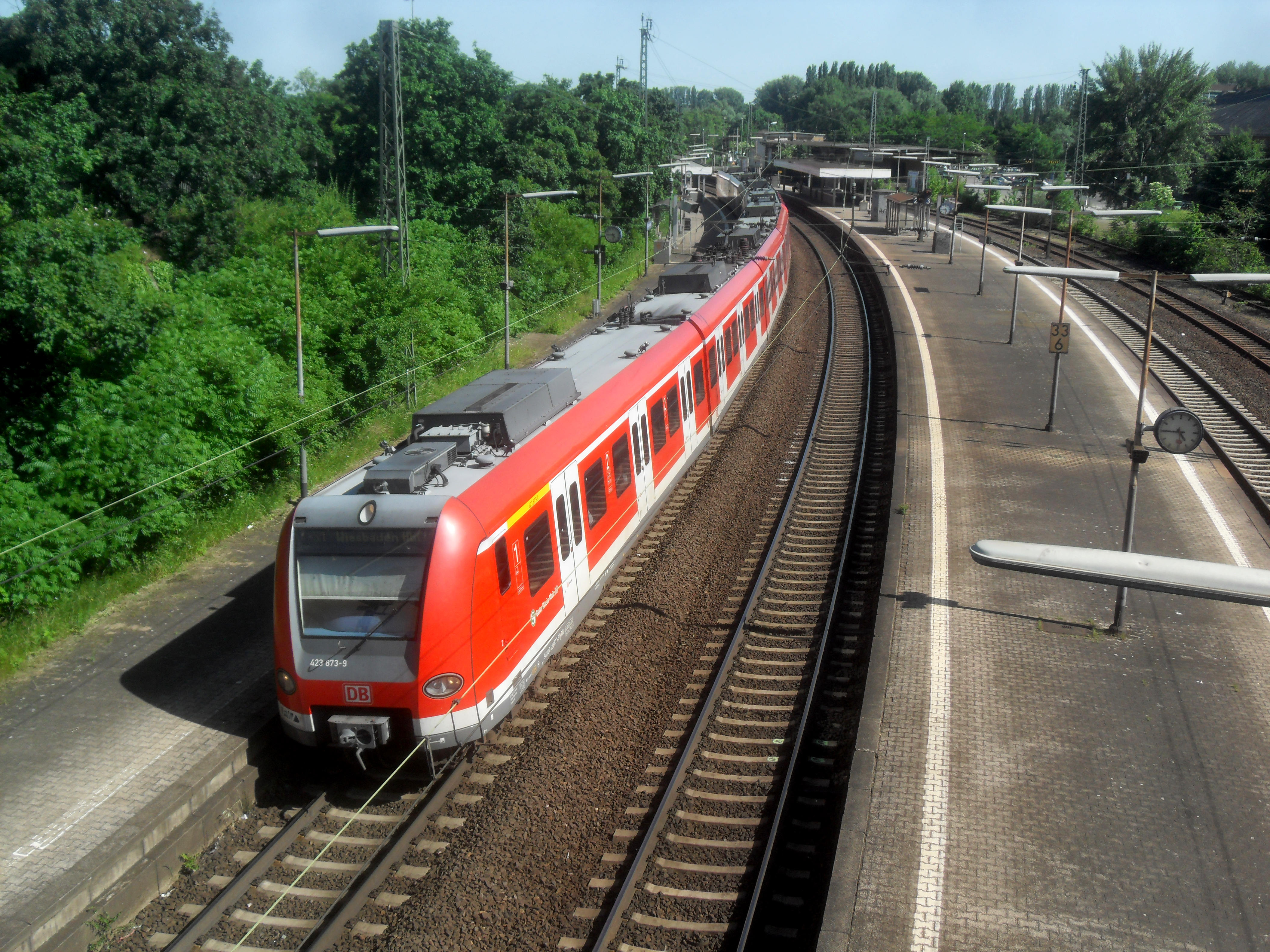 Triebwagen der DBAG-Baureihe 423 der S-Bahn Rhein-Main auf der Linie S 1 auf der Taunus-Eisenbahn im Mainz-Kasteler Bahnhof auf dem Weg nach Wiesbaden in Hessen (Deutschland)